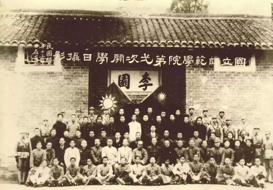 中文（台灣）: 國立師範學院最初借用辛亥革命元勳李燮和、李雲龍兄弟的李園住宅為校舍，再在緊鄰的光明山（今在漣源一中内）修建教室、寢室、辦公樓、圖書館、音樂教室等。